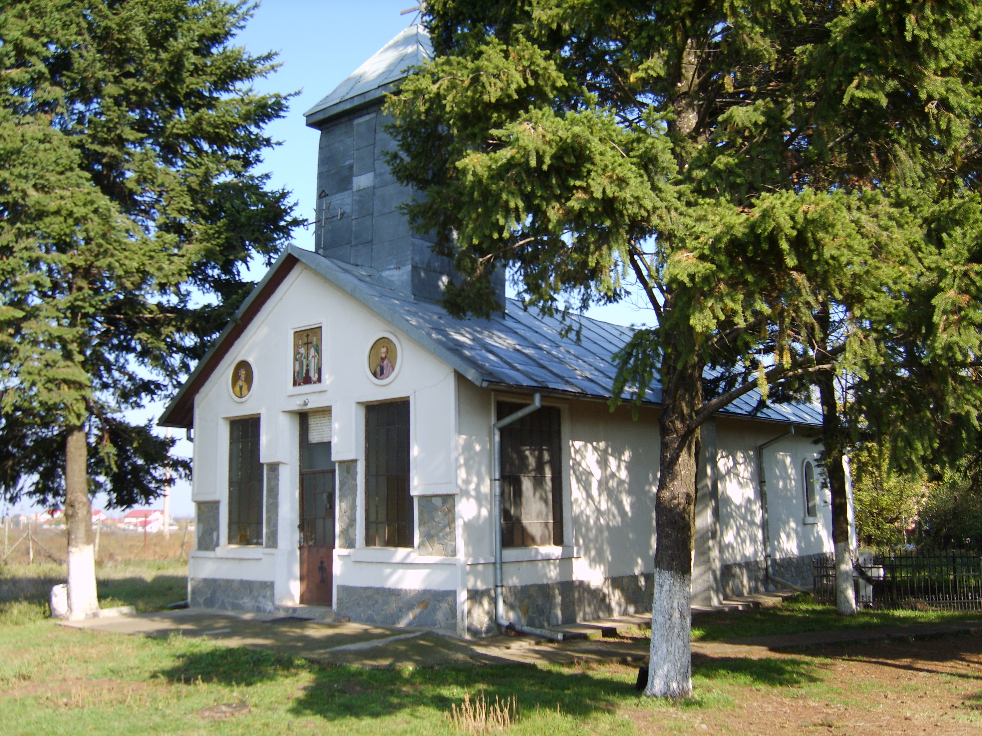 Biserica Crețuleasca Ștefănesti de Jos, an construcție 1818